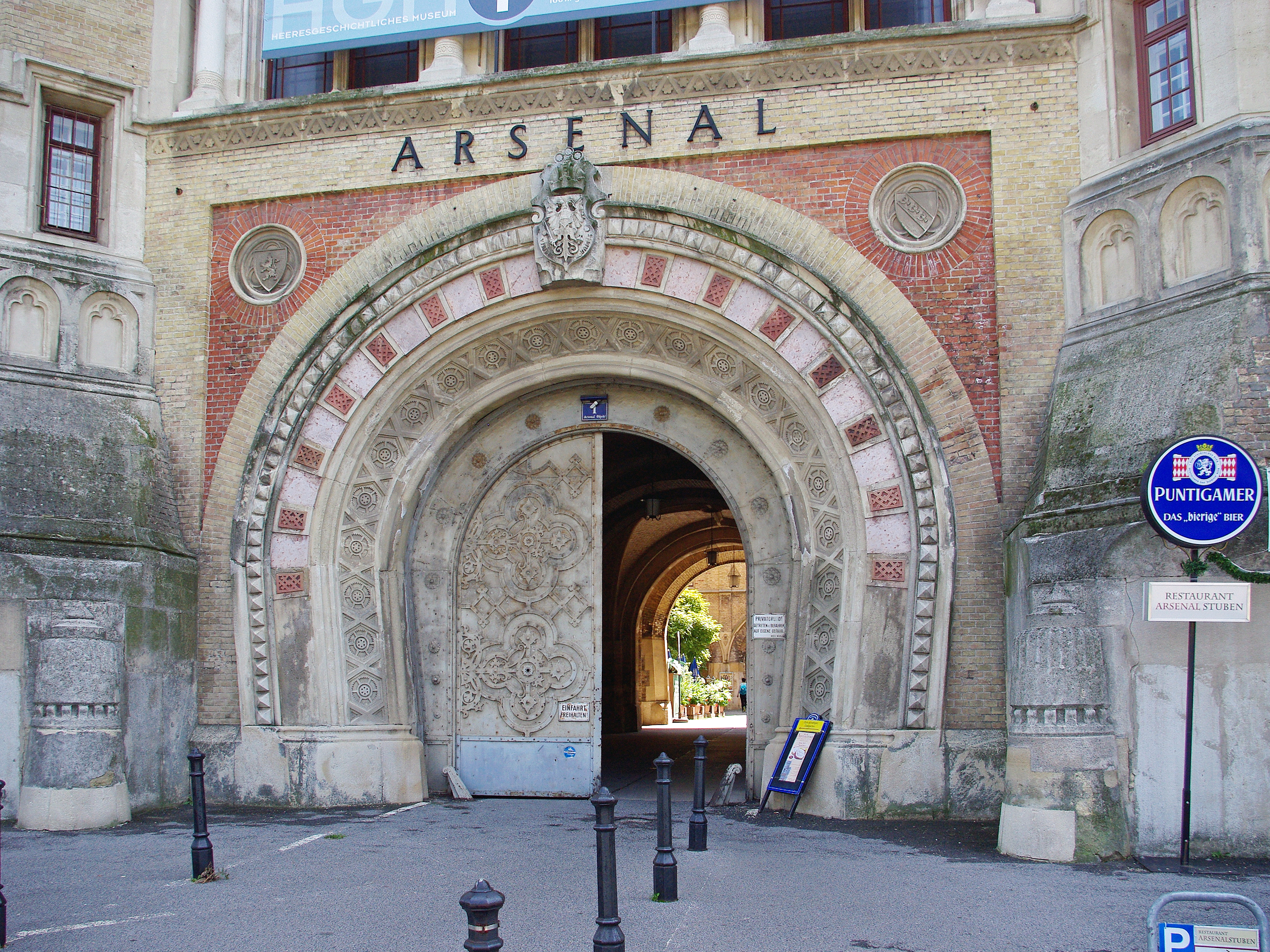 Arsenal, Objekte 1–6, 12, 14, 15, 16–18 sowie Bundestheaterwerkstätten u. -bühne